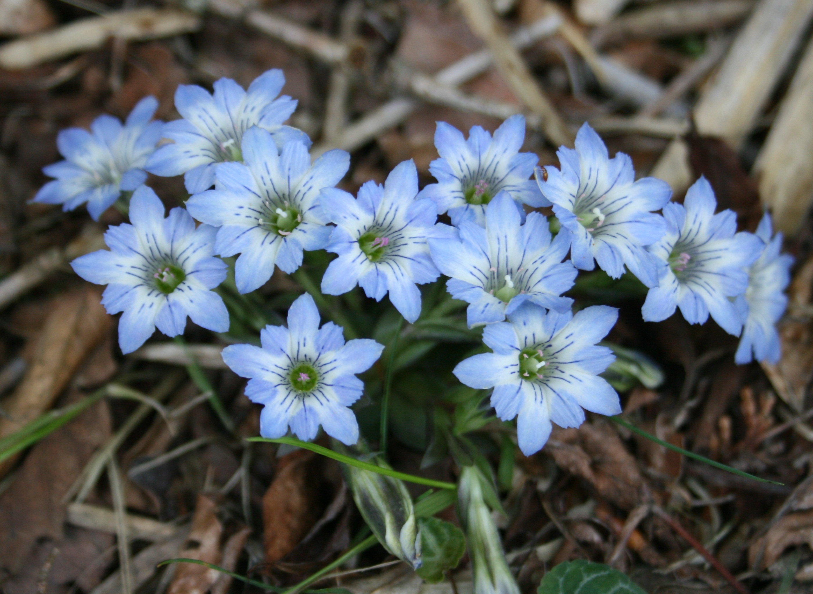 ハルリンドウ、開花直後の「雄性期」（中央に雄しべのみが機能する時期）と「雌性期」（移行後の中央の白い雌しべが機能し2つに裂けたもの）の花が混在、ハルリンドウは「雄性先熟」、御在所岳にて